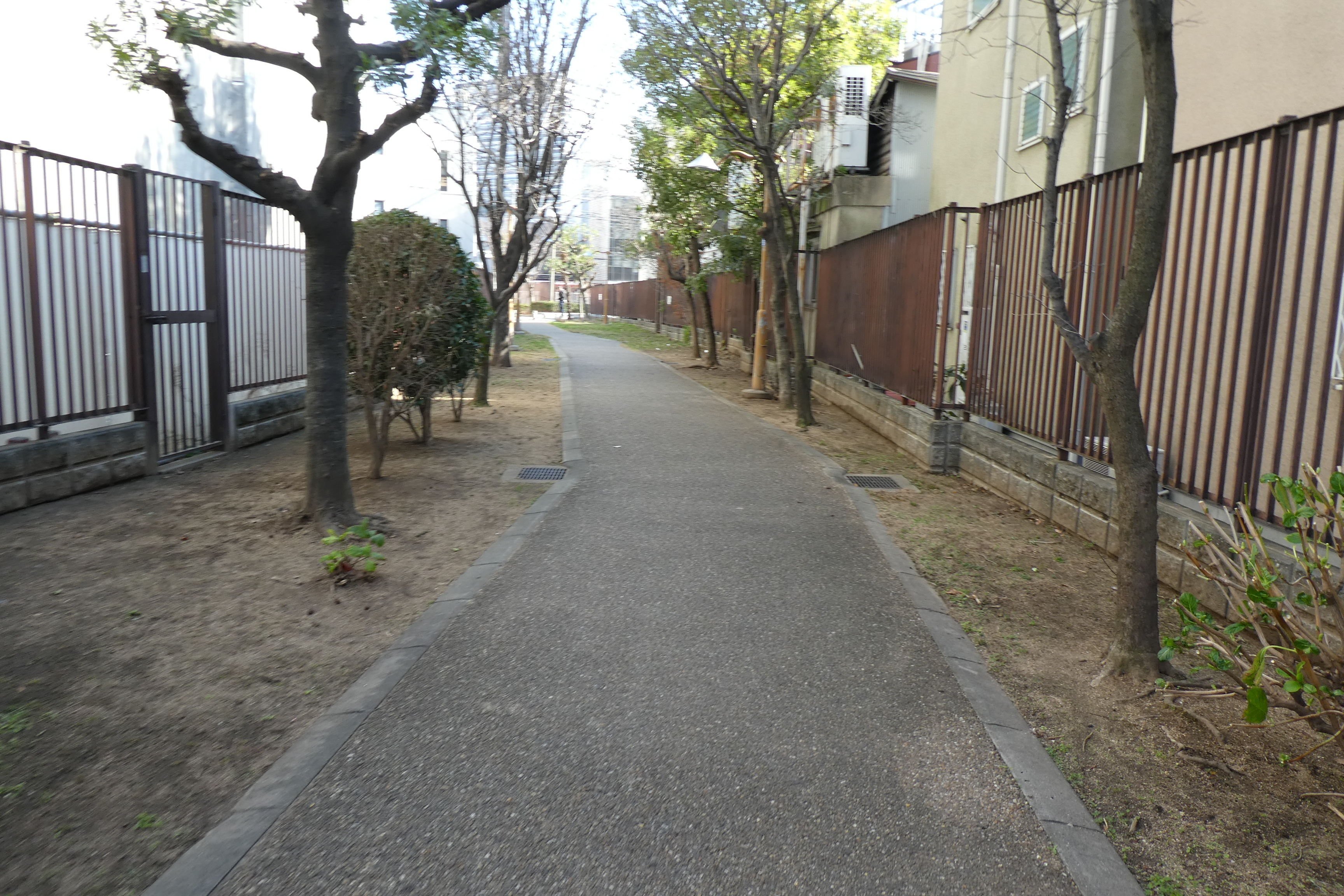 大阪環状線 大阪市場支線 線路跡。